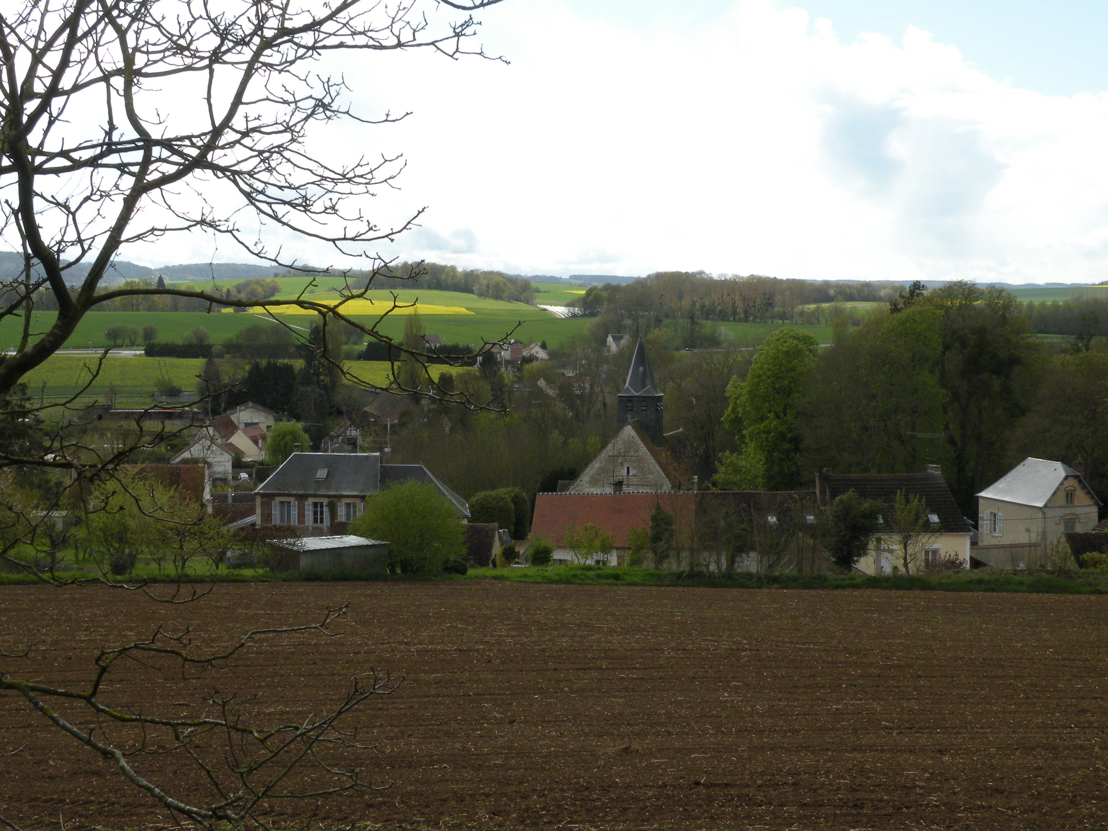 vue de Ponchon